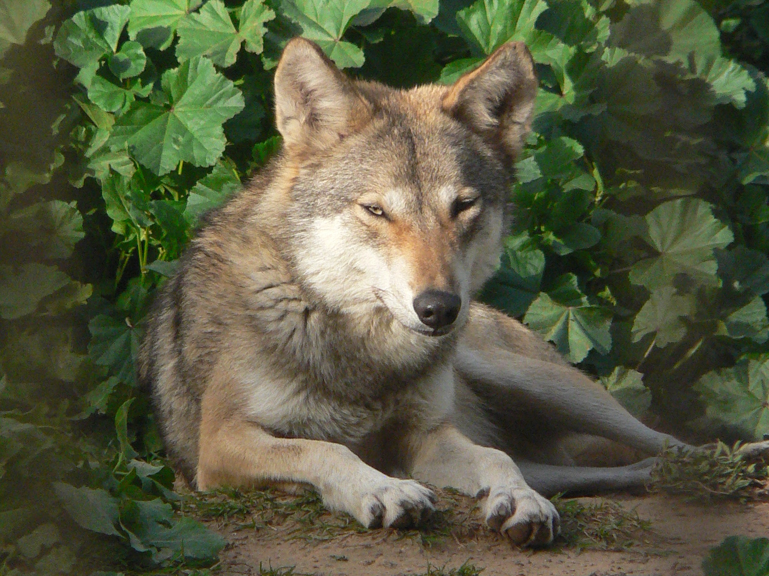 צולם בגן הזואולוגי בת"א Taken in Tel Aviv Zoological Gardens זאב Wolf